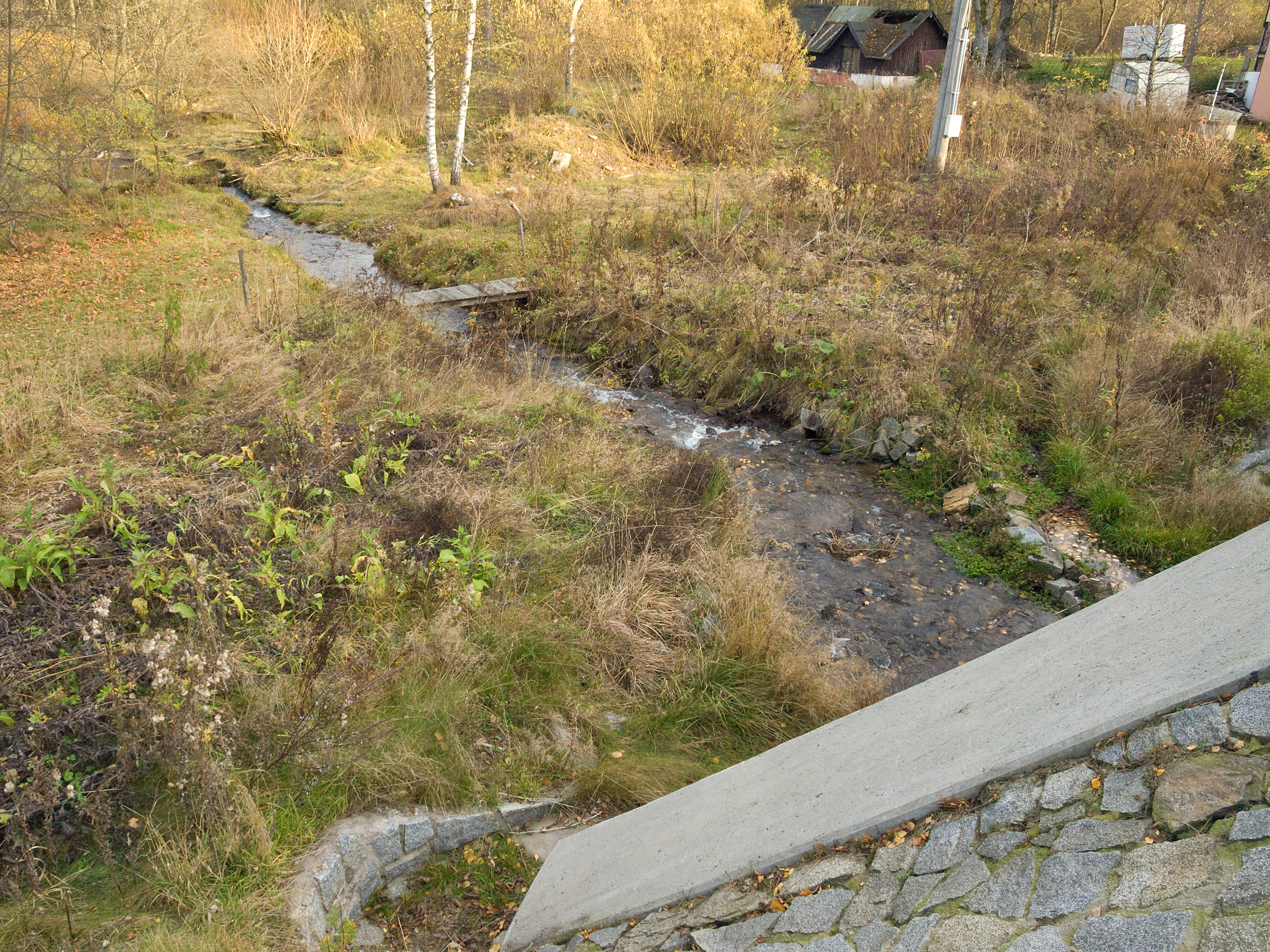 Potok Šukačka, KÚ Javorná na Šumavě